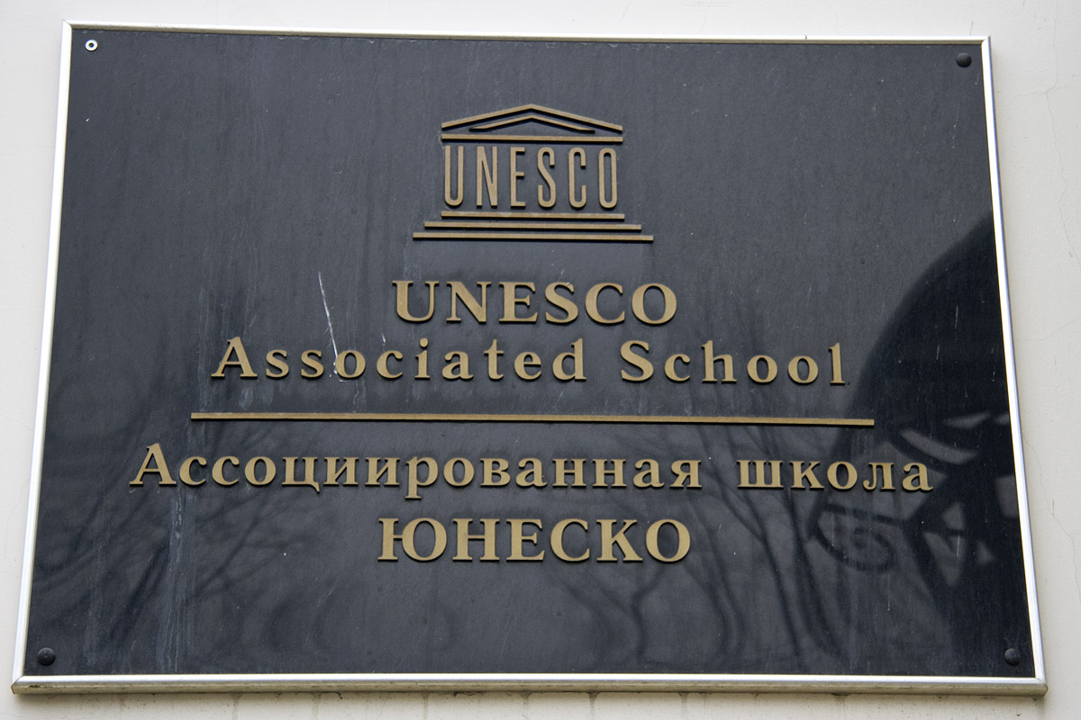 Табличка на фасаде Гимназия № 9. 2013 год.